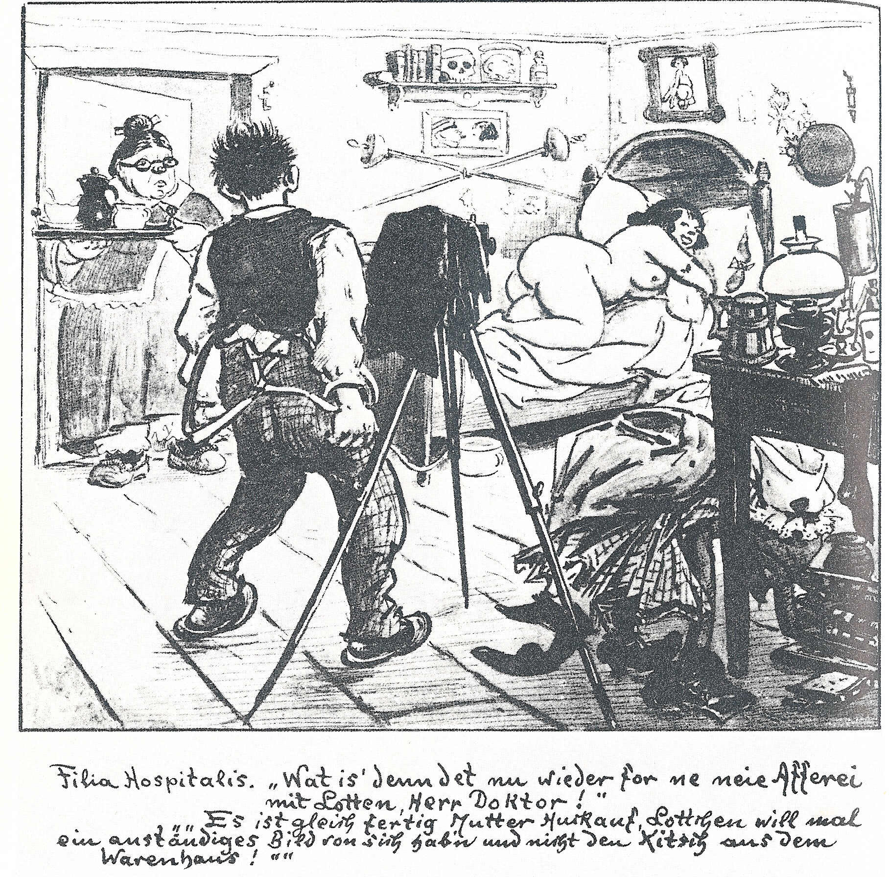 Die Filia Hospitalis, wie die Wirtstocher in der Studentensprache genannt wurde, ist auch Thema des "Milljöh"-Zeichners Heinrich Zille, hier allerdings nicht romantisierend und verkitschend wie sonst oft üblich. Man beachte, wie sich die Wirtin über ihre unbekleidete Tochter im Bett des Studenten überhaupt nicht aufregt, sondern vielmehr über den seltsamen, neumodischen Apparat des "Herrn Doktor". In vielen deutschen Universitätsstädten wurden alle Studenten ab dem ersten Semester von der ortsansässigen Bevölkerung mit "Herr Doktor" angesprochen. An der Wand über dem Bett zwei gekreuzte Glockenschläger, die in Berlin übliche Mensurwaffe, was den Studenten als Mitglied einer schlagenden Verbindung ausweist. Die Utensilien auf dem Bücherbord (siehe auch: Totenkopf) lassen einen Medizinstudenten erkennen. Zeichnung von Heinrich Zille, gestorben 9. August 1929, Rechte abgelaufen, Public Domain